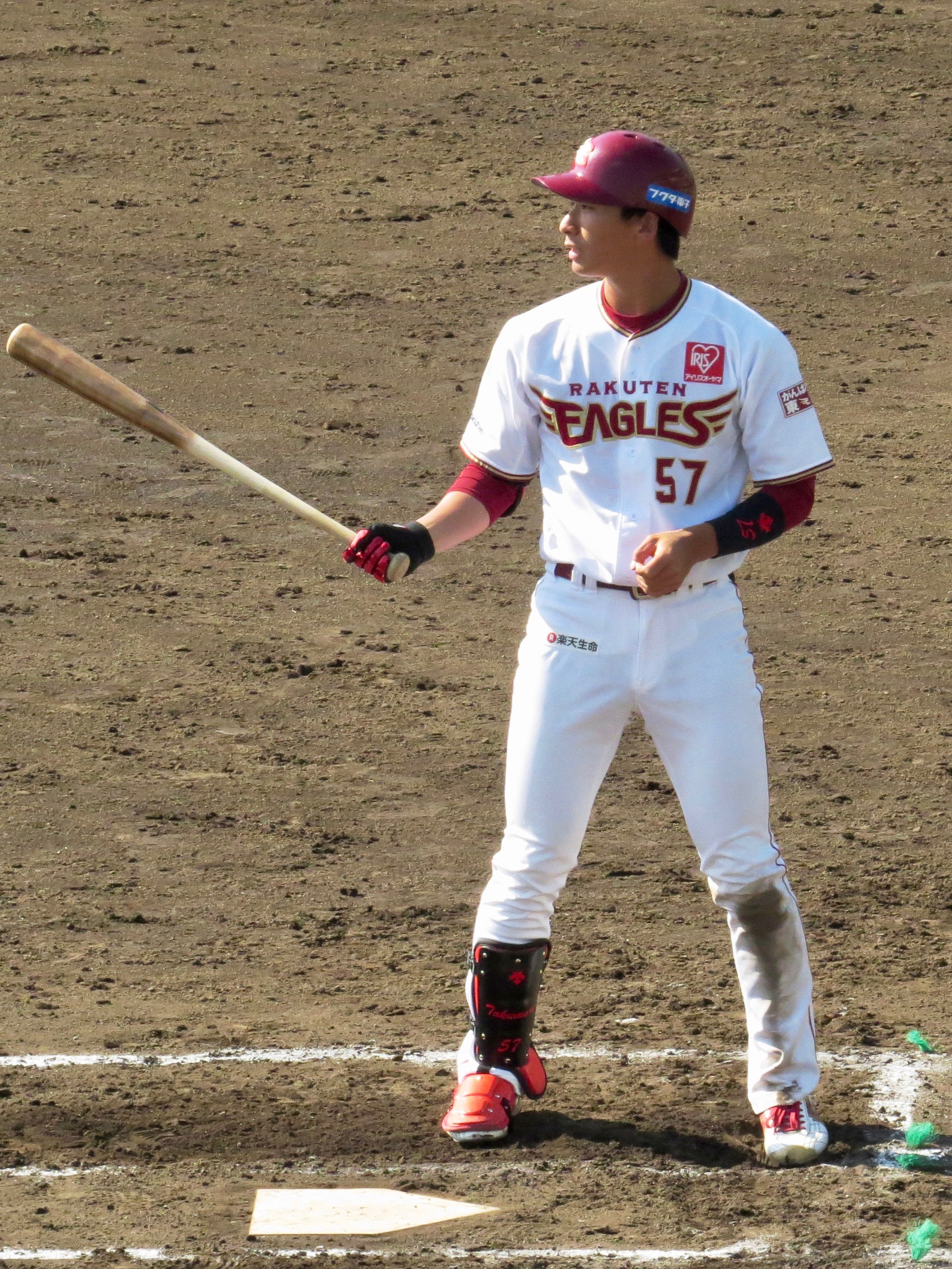 さいたま市営浦和球場にて